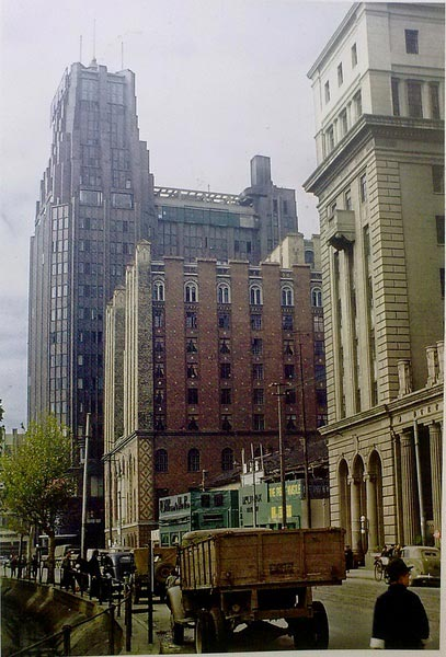 中文（中国大陆）: 飞虎队来沪拍摄